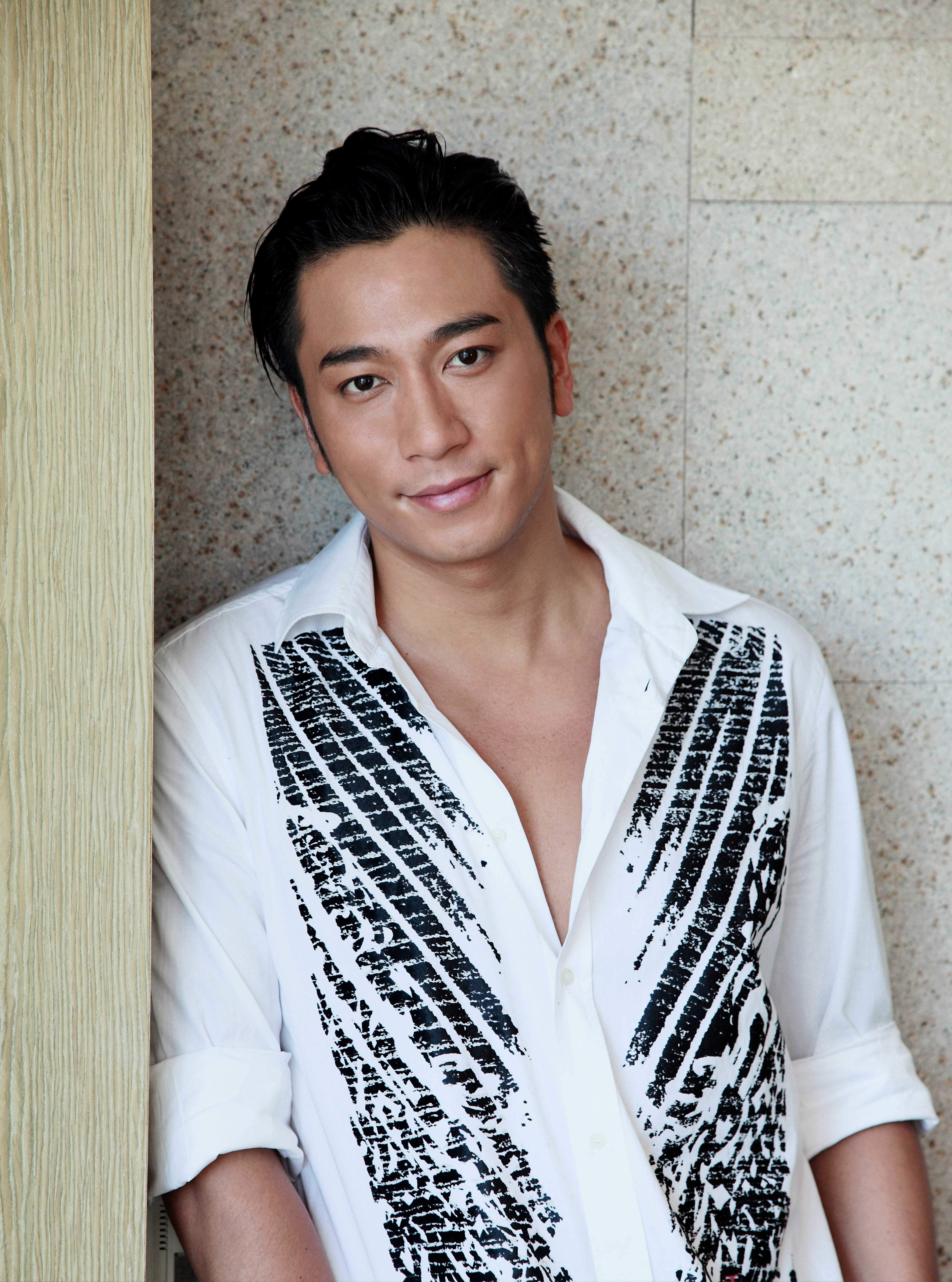 Penang @ Malaysia 2013